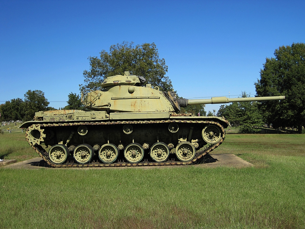 Batesville, Mississippi. VFW Post